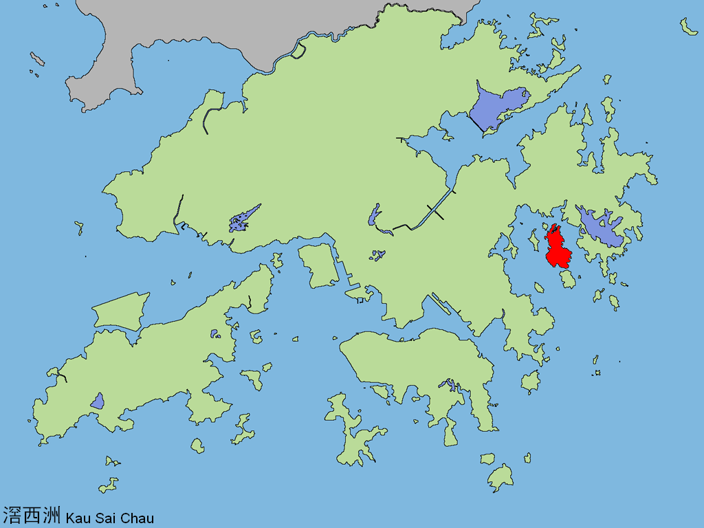 中文（香港）: 滘西洲。